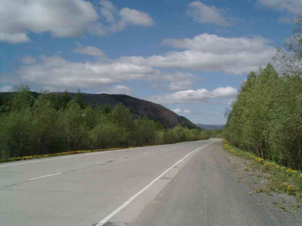 Колымская трасса, Хасынский район